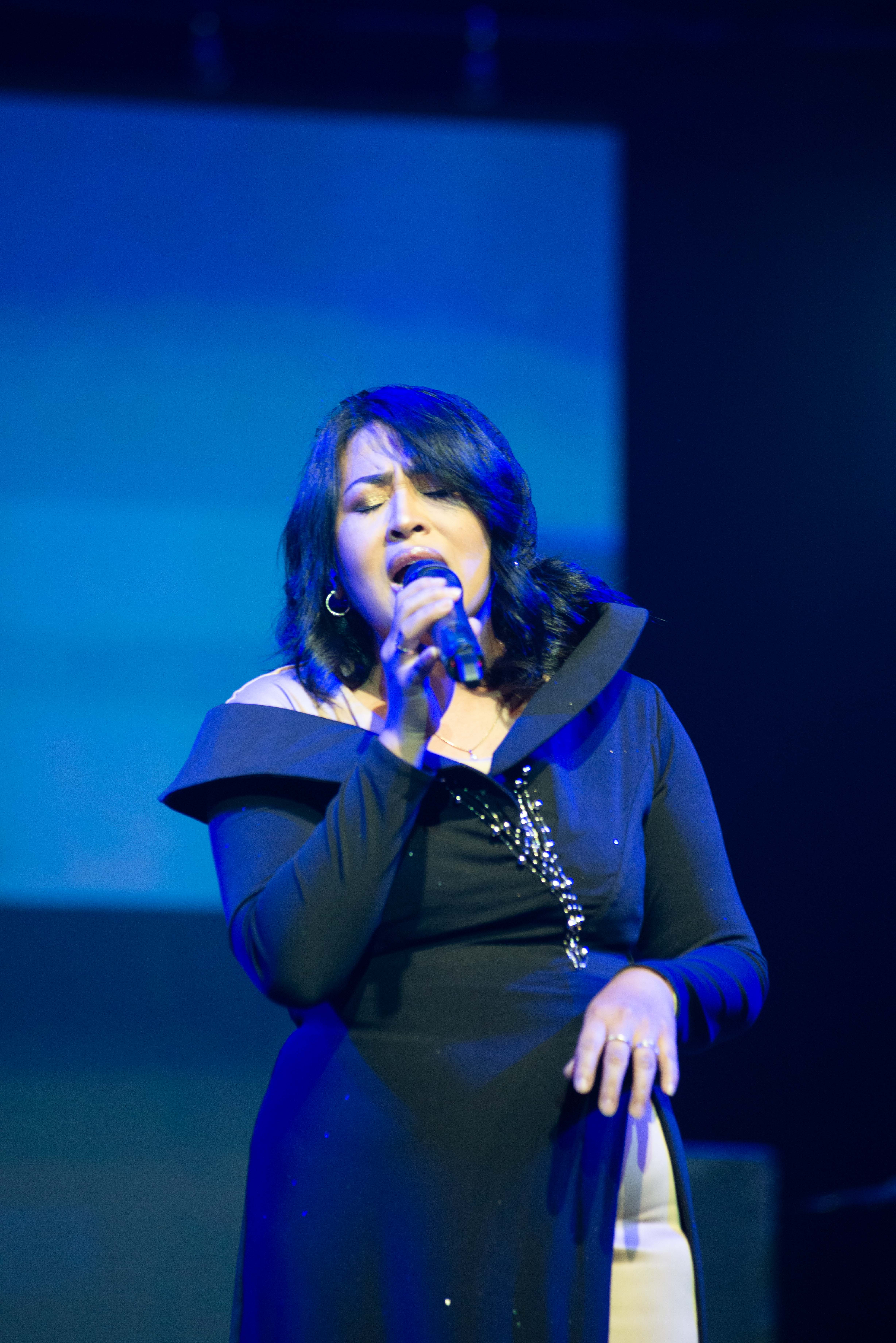 CONCERT MIFAMPITANTANA 2020